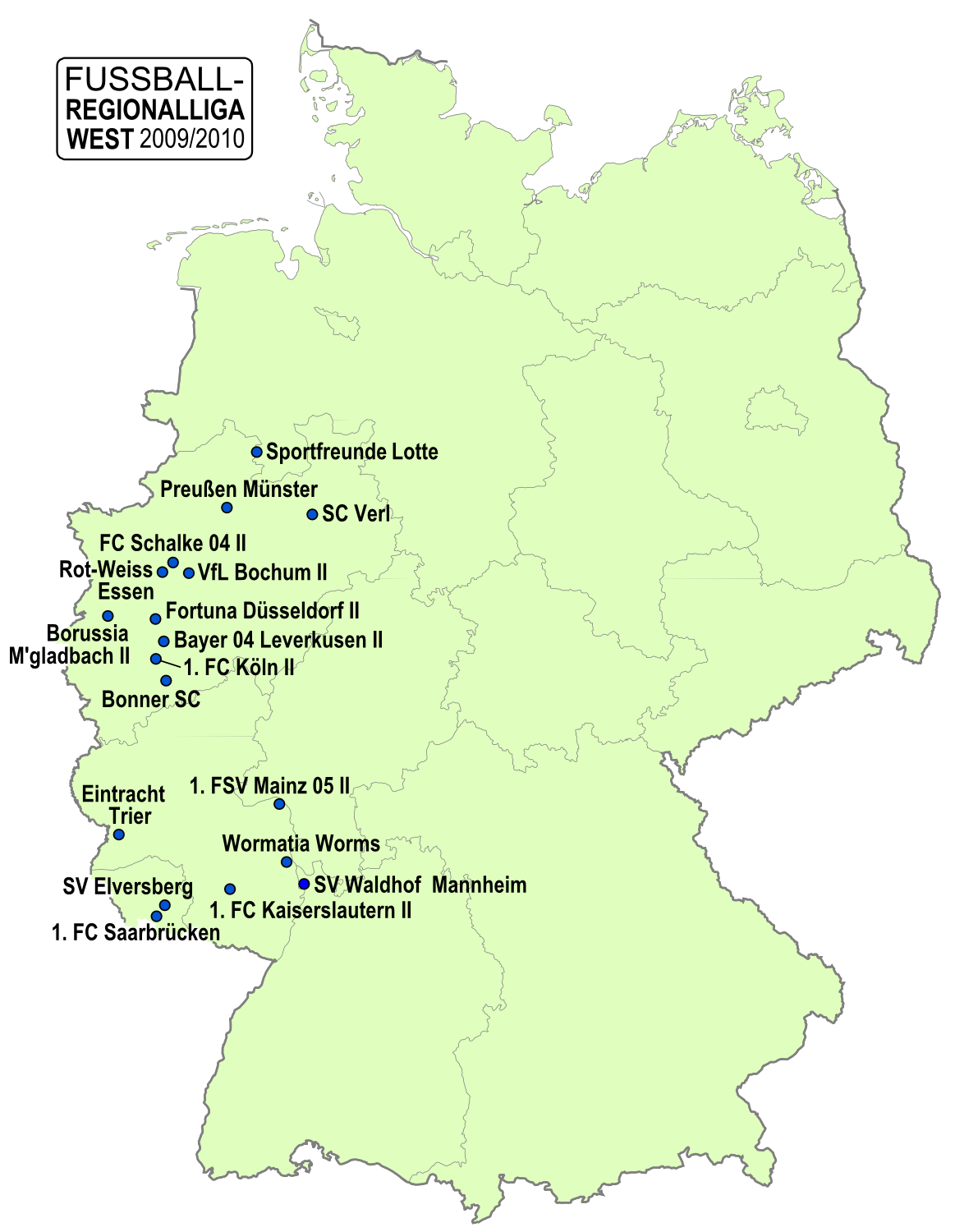 Karte der Vereine der Fußball-Regionalliga West, Saison 2009/2010